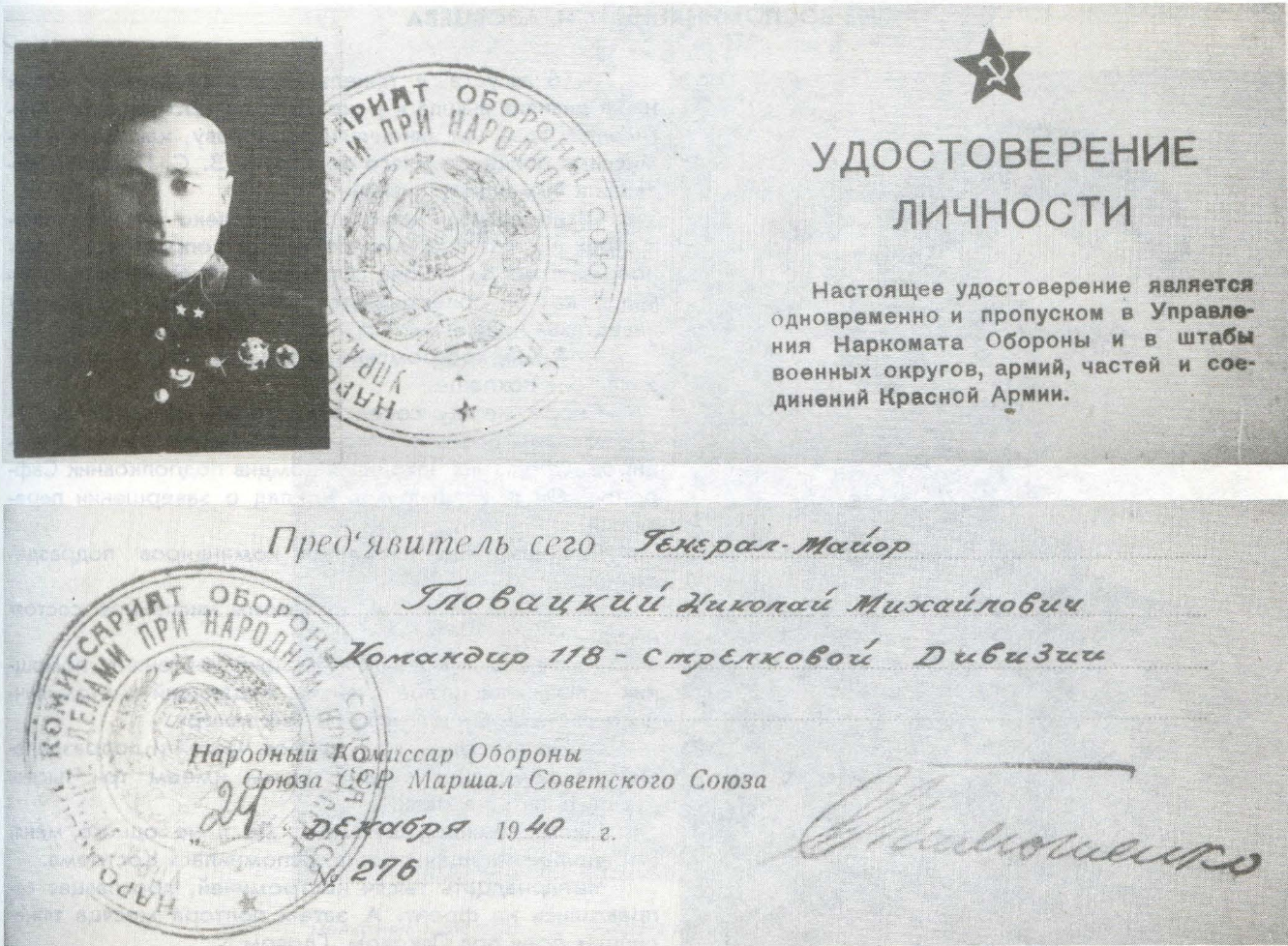 Удостоверение личности командира 118-й ед генерал-майора Н. М. Гловацкого, подписанное Наркомом Обороны СССР Маршалом Советского Союза С. К. Тимошенко